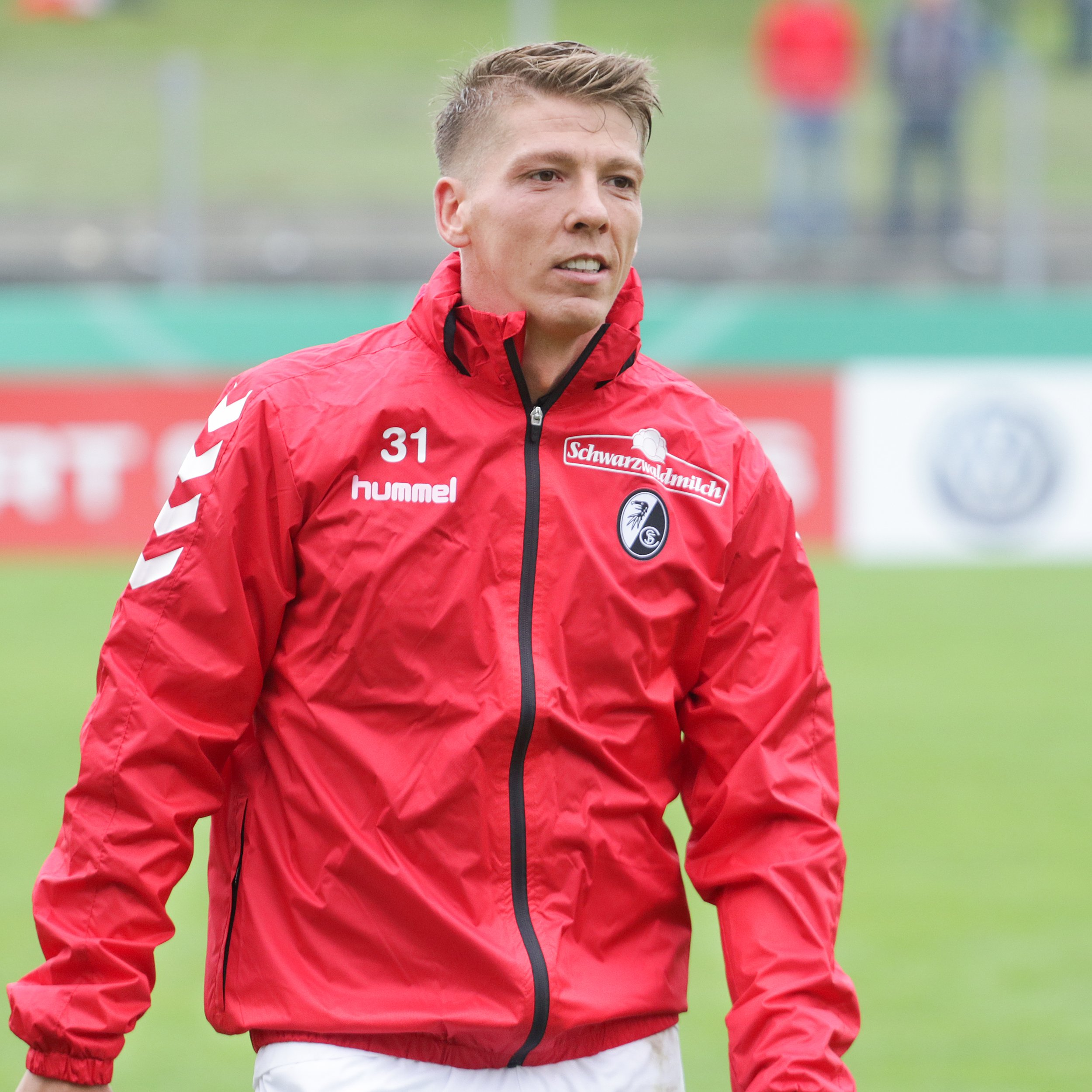 Mike Frantz beim DFB-Pokalspiel VfB Germania Halberstadt vs. SC Freiburg